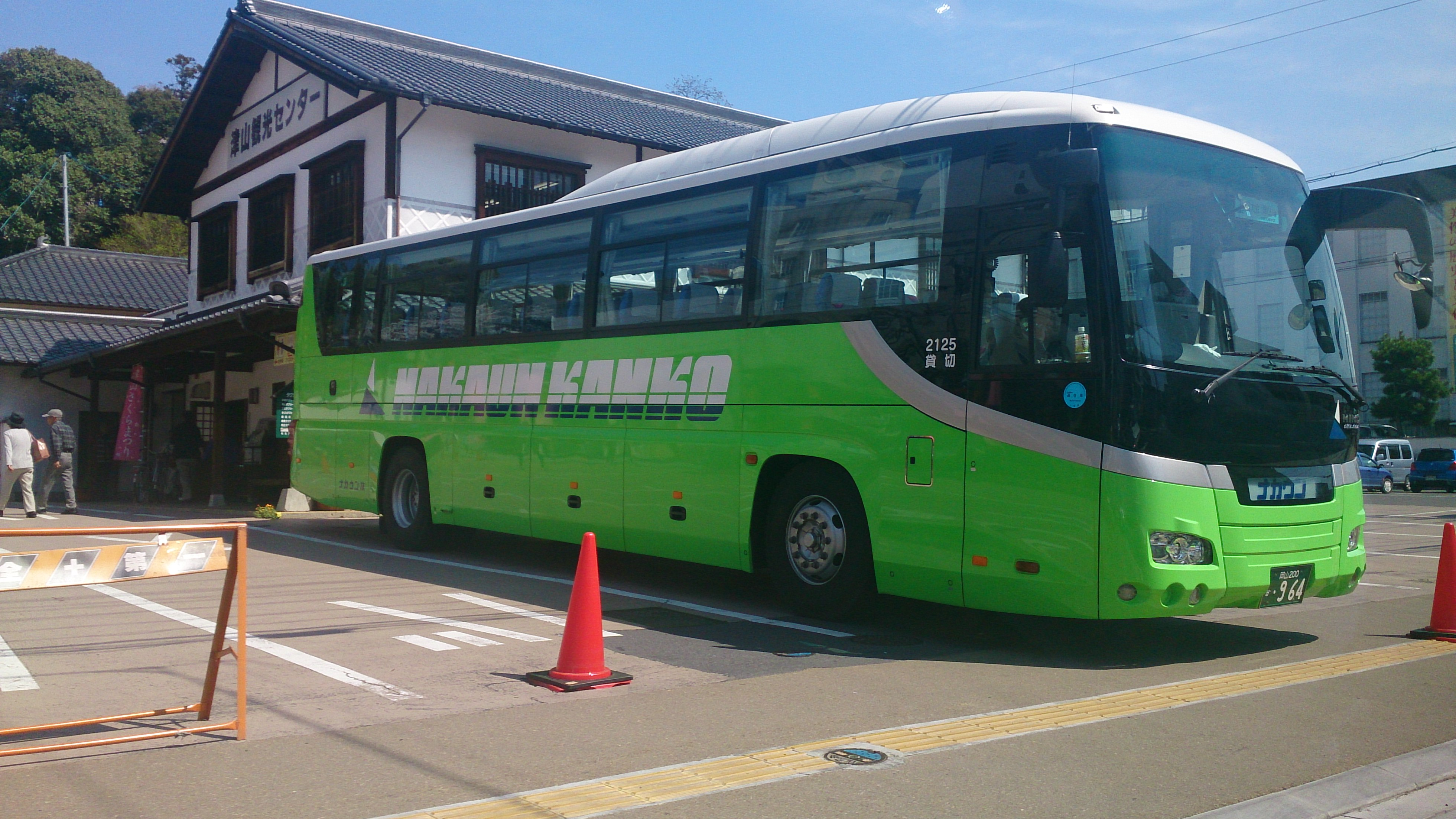 鶴山公園(旧 :津山城)に接する津山観光センター駐車場にて停車中を撮影。